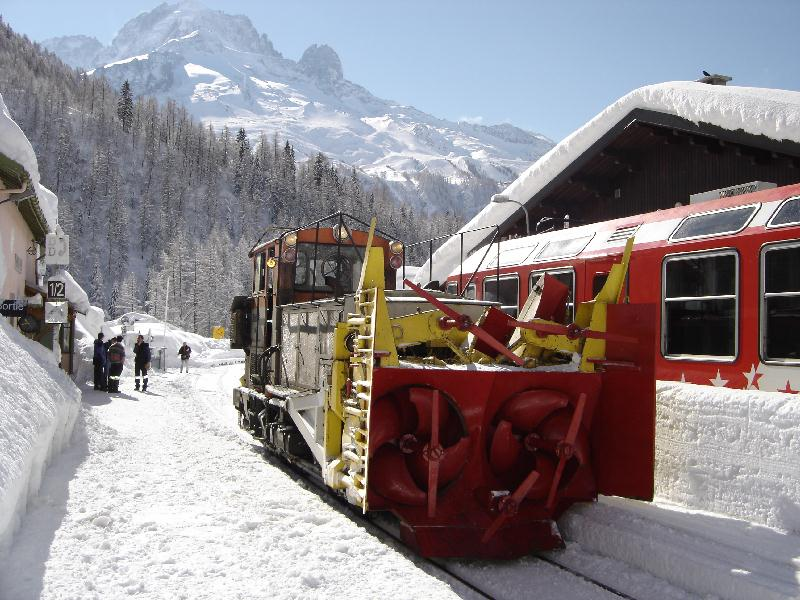 Chasse-neige CN4 de la Ligne Saint-Gervais-les-Bains-Le Fayet - Vallorcine